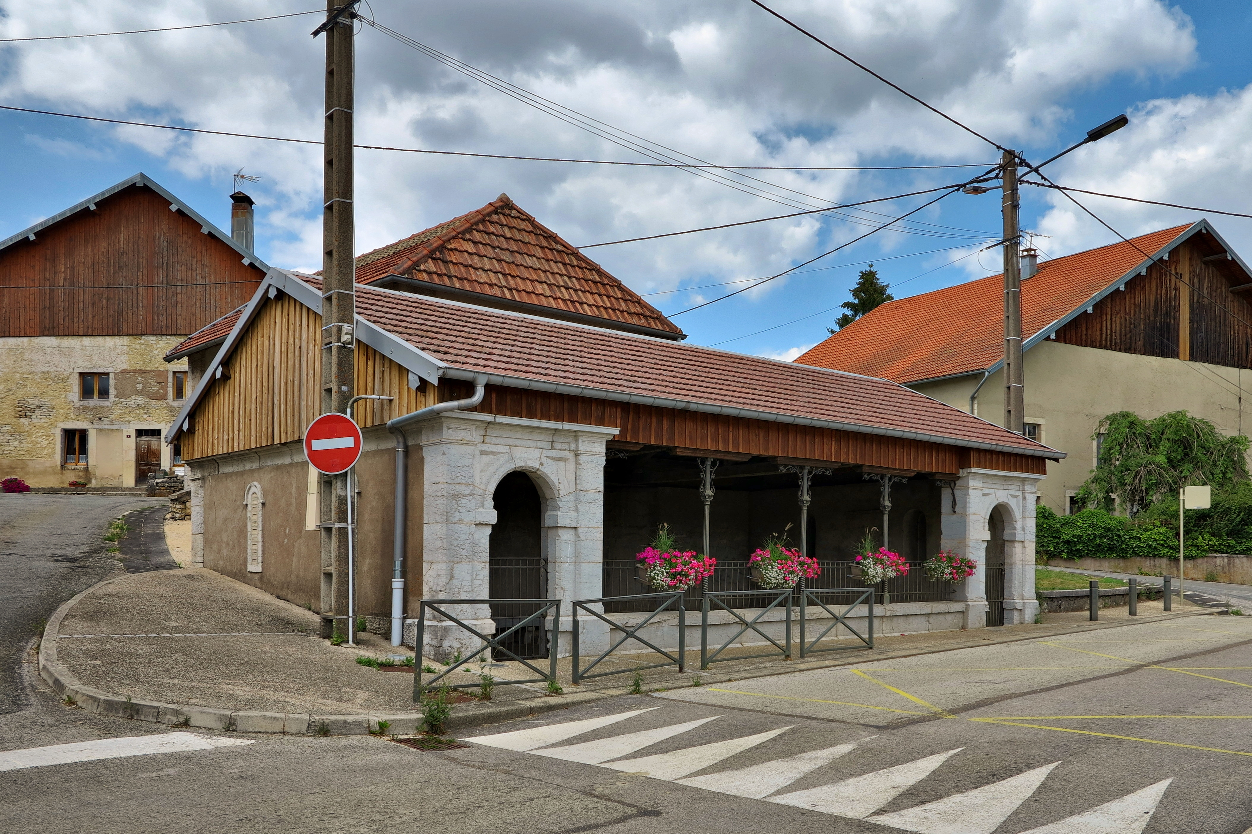 Le lavoir